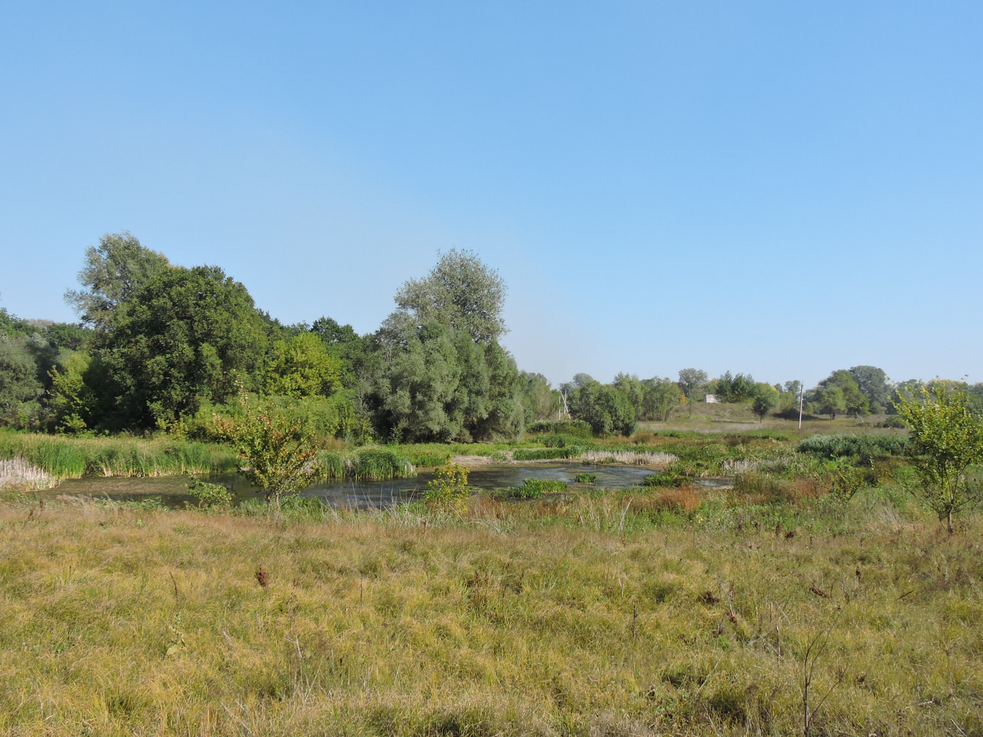 Поселення двошарове: доби бронзи та скіфське., Кам'янка, у лісі на лів. Березі р. Сів. Дінець навпроти села